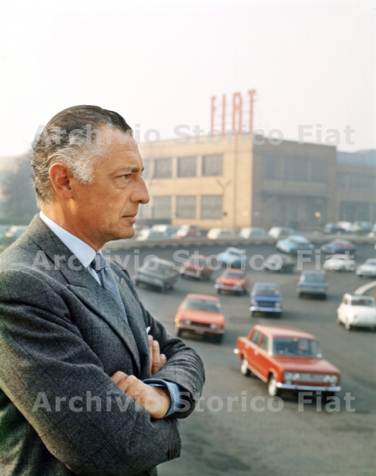 Fotografia a mezzo busto di Gianni Agnelli. Sullo sfondo stabilimento Fiat Mirafiori e automobili (Archivio e centro storico Fiat, Archivio iconografico, Personaggi Fiat, Gianni Agnelli)